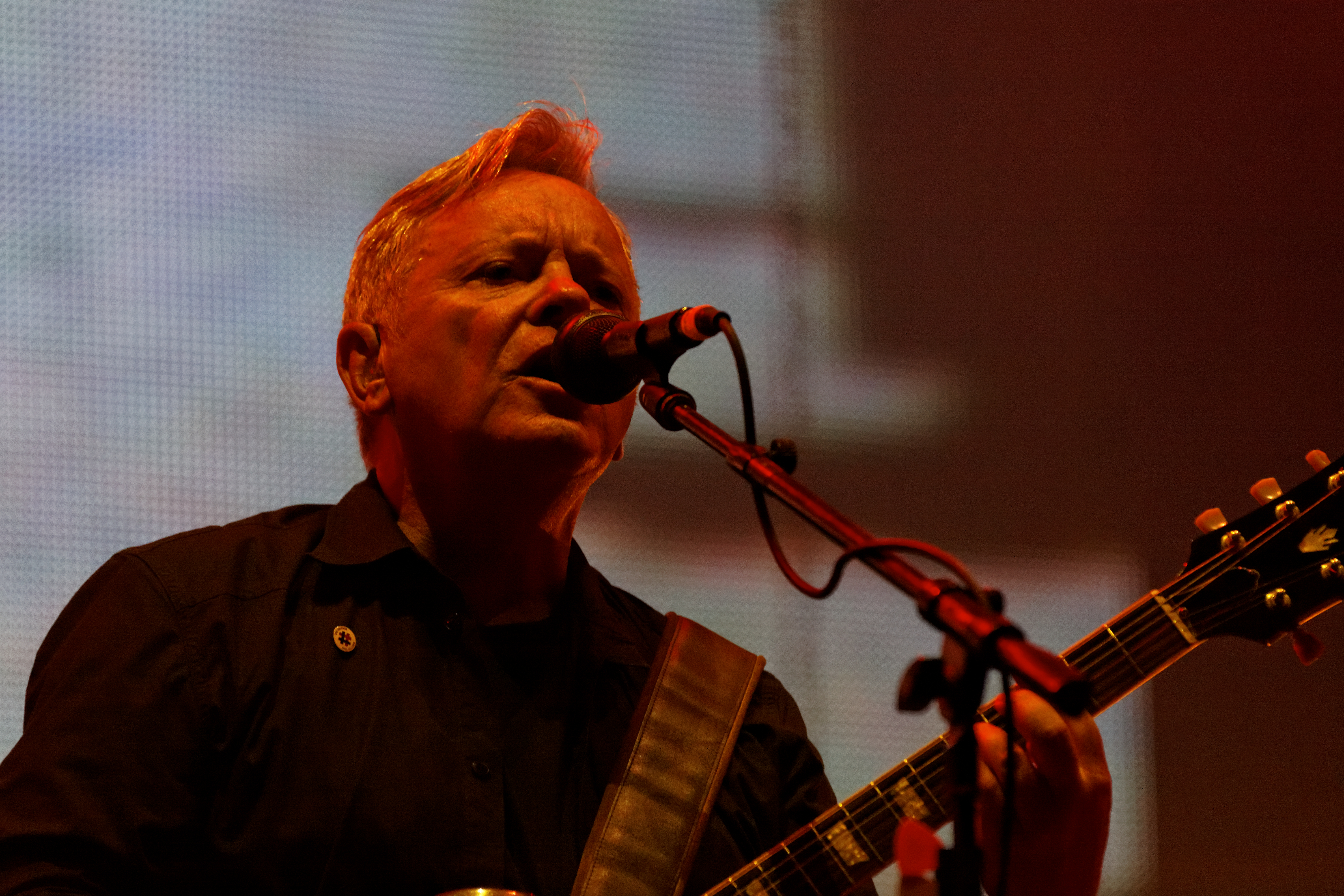 New Order en concert sur la grande scène lors de la fête de l'Humanité 2012.